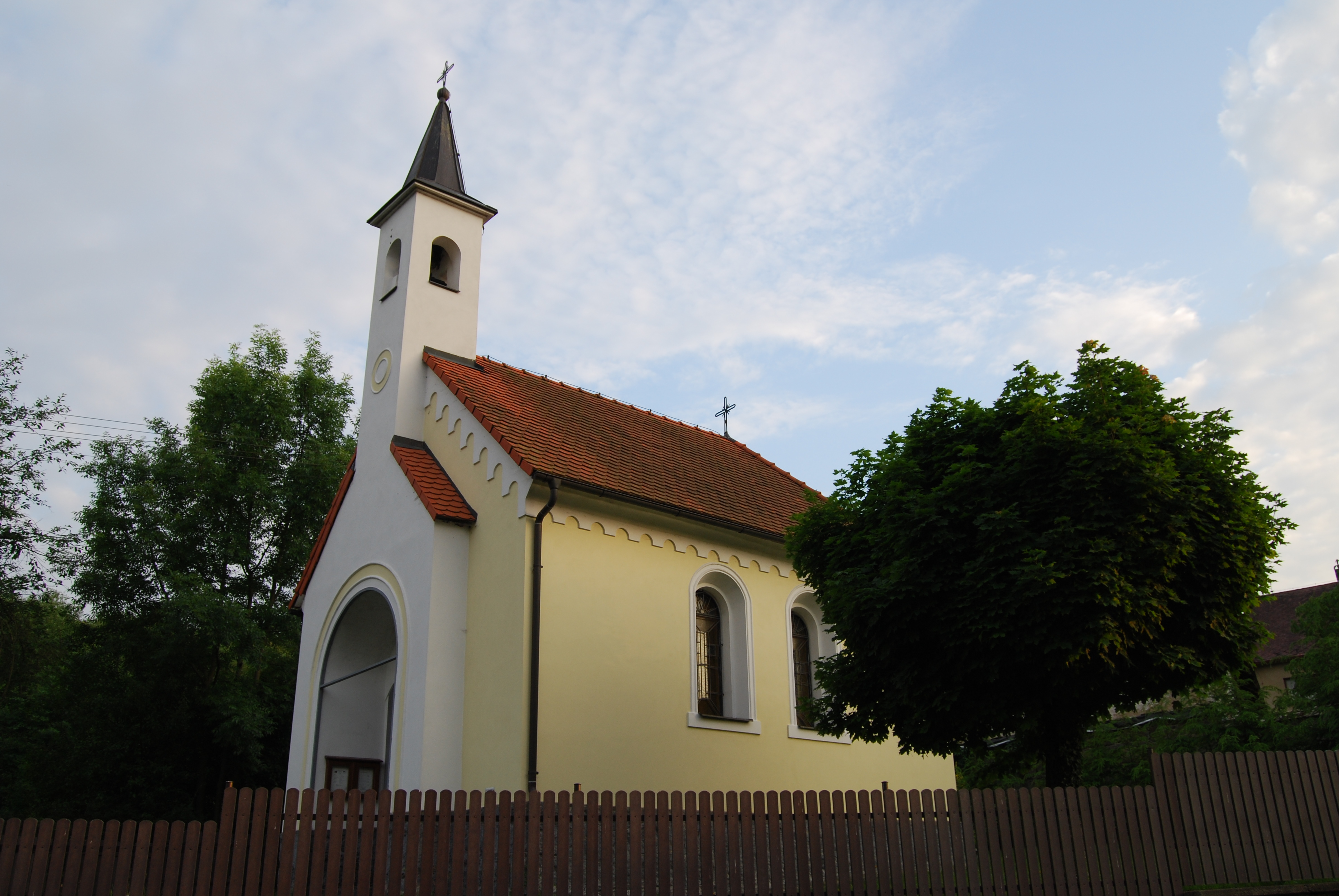 Kaple svatého Ducha. Hrazany. Okres Písek. Česká republika.